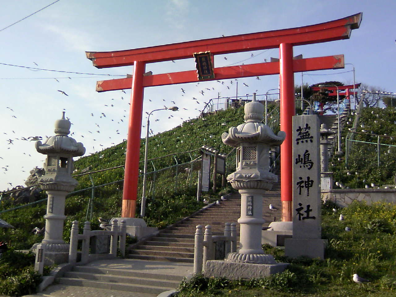 蕪島「蕪嶋神社・鳥居」 (Kabushima Torii - HACHINOHE, AOMORI, JAPAN)